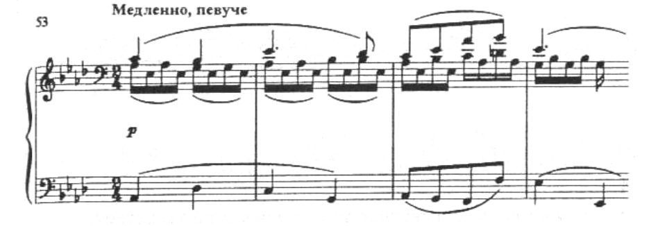 музыка